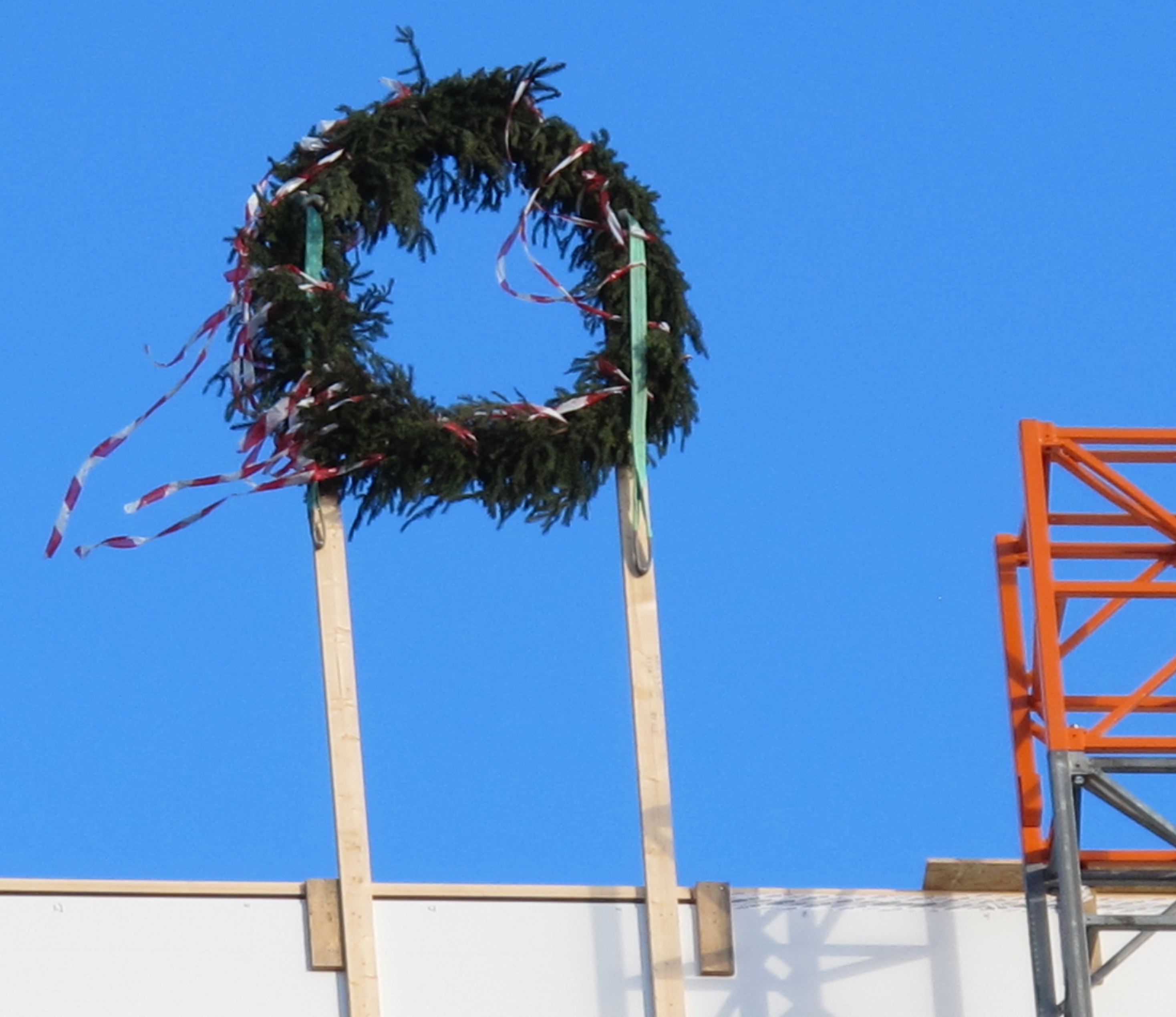 Kranselag på AAks nybygg i 2013. Kransen henger lett synlig på kanten av taket og markerer at huset er under tak, og at arbeiderne har krav på en fest bekostet av byggherren.